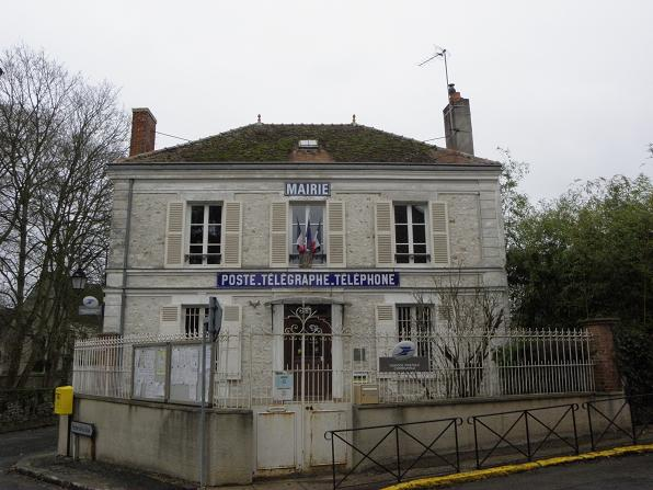 Mairie de Féricy (77).